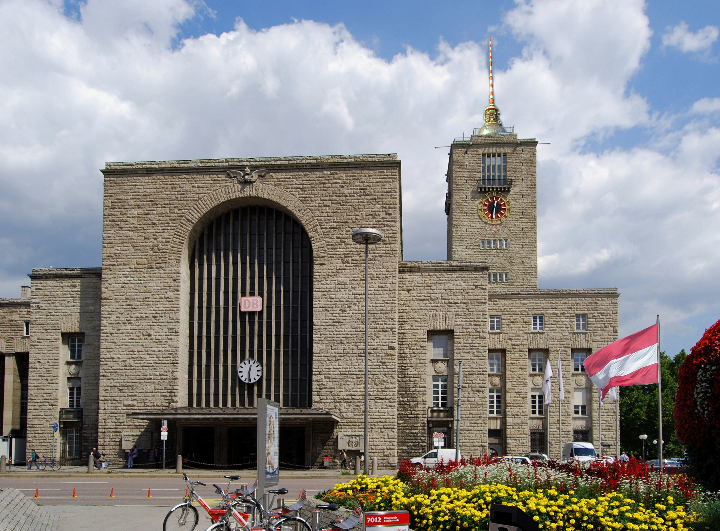 Stuttgarter Hauptbahnhof, Bahnhofsturm